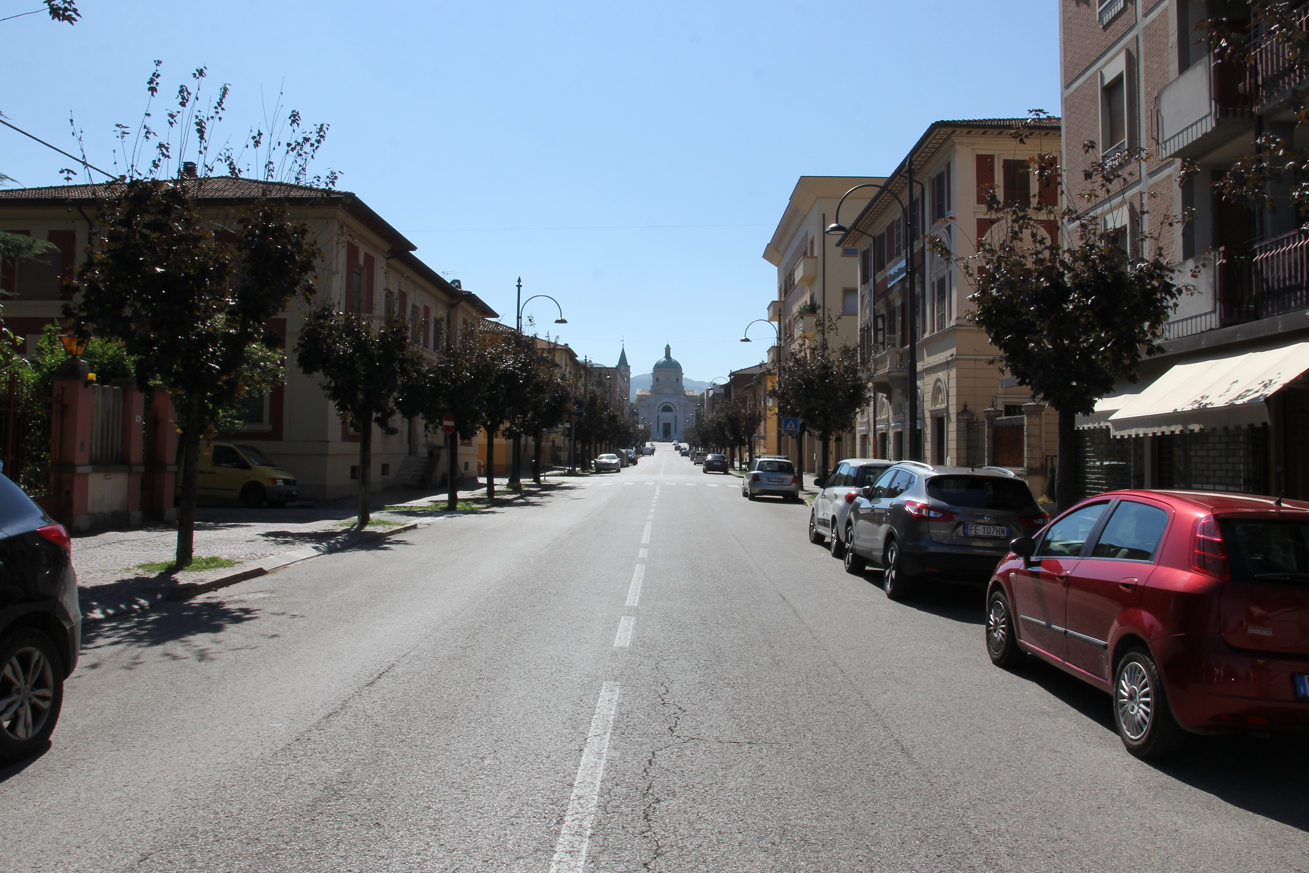 Predappio, strada provinciale 9 ter del Rabbi